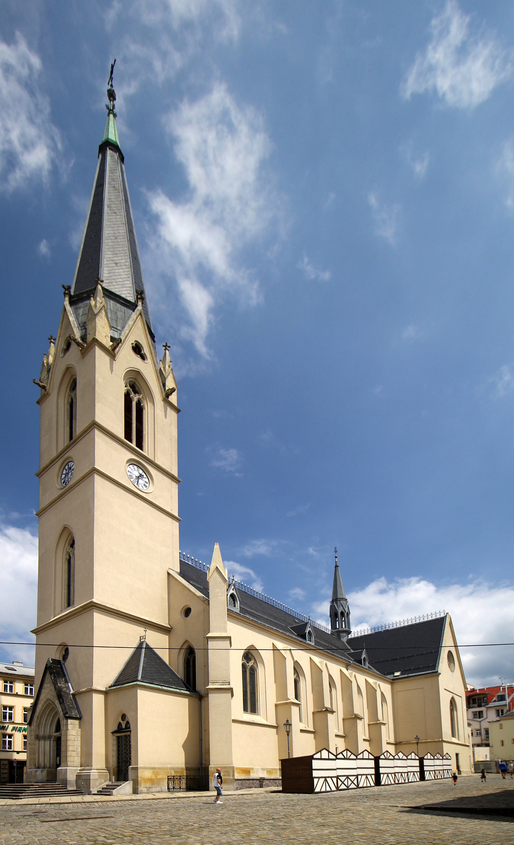 Liberecký kostel svatého Antonína Velikého